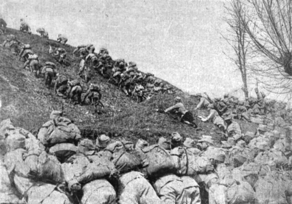 D - Vanatorii de munte in luptele de la Ciresoaia 1 Kiritescu 623